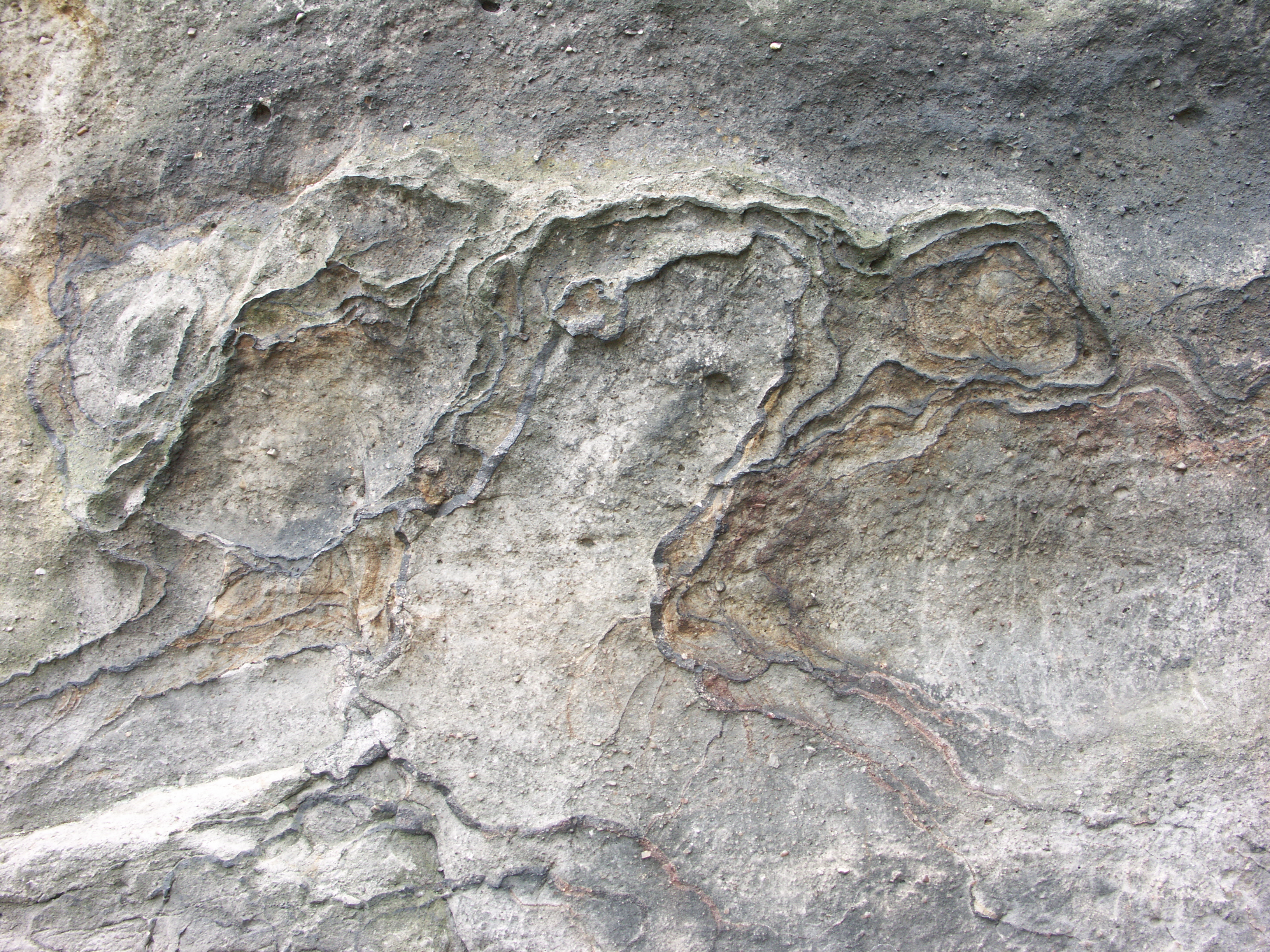 Das Naturschutzgebiet D27 Jonsdorfer Felsenstadt ist eine Sandsteinformation, die von Eisenoxydablagerungen durchzogen ist. Diese ergeben interessante Ablagerungsstrukturen.